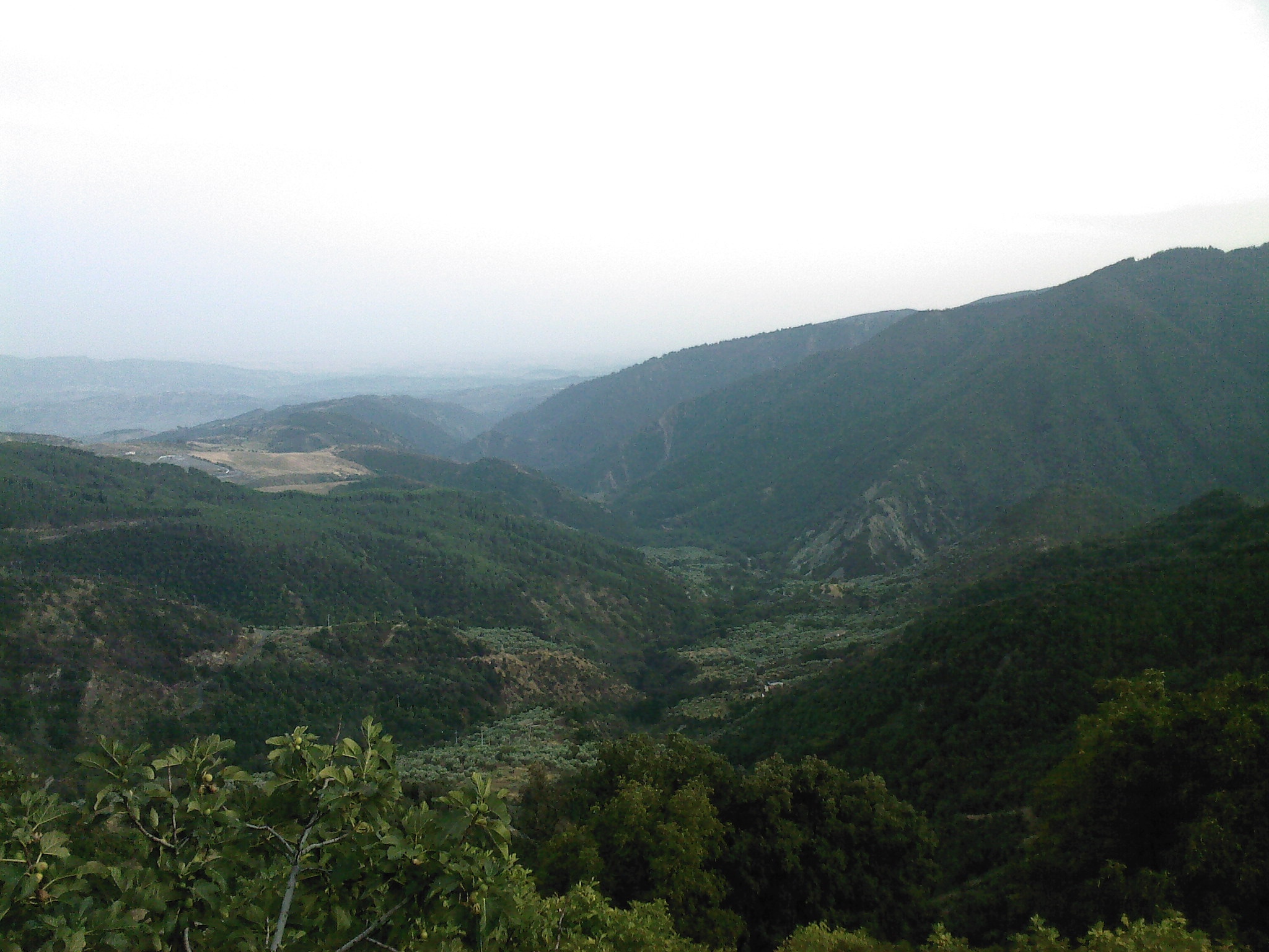 Il paese-fantasma di Carello visto da Fantino